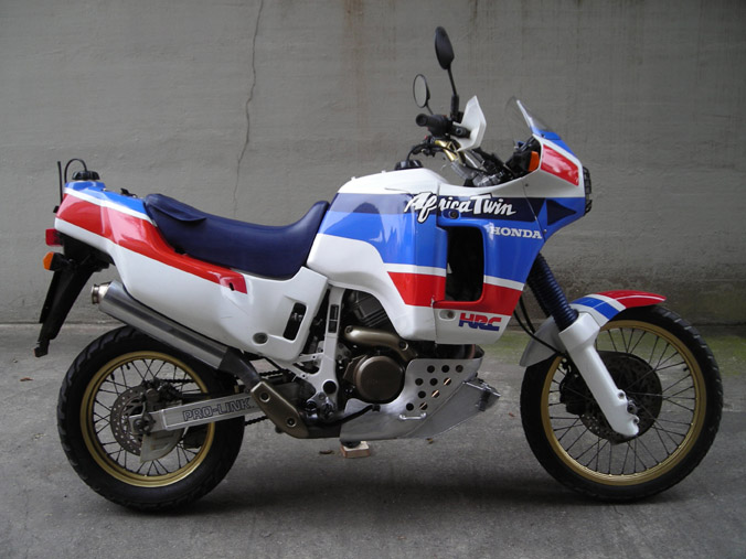 Honda Africa Twin 650 Marathon, model 1989